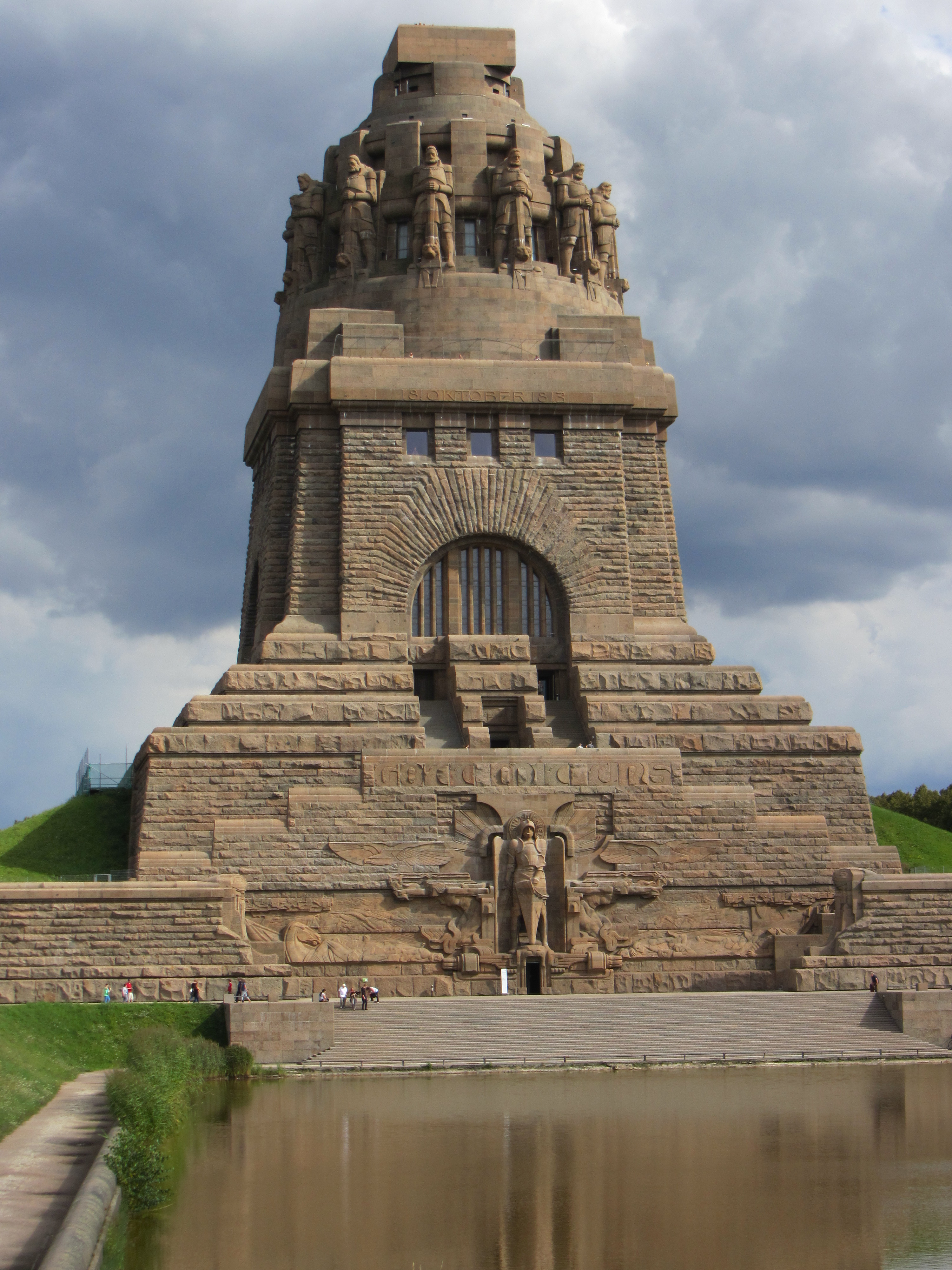 Das Völkerschlachtdenkmal im Südosten Leipzigs wurde in Erinnerung an die Völkerschlacht bei Leipzig nach Entwürfen des Berliner Architekten Bruno Schmitz errichtet und am 18. Oktober 1913 eingeweiht.